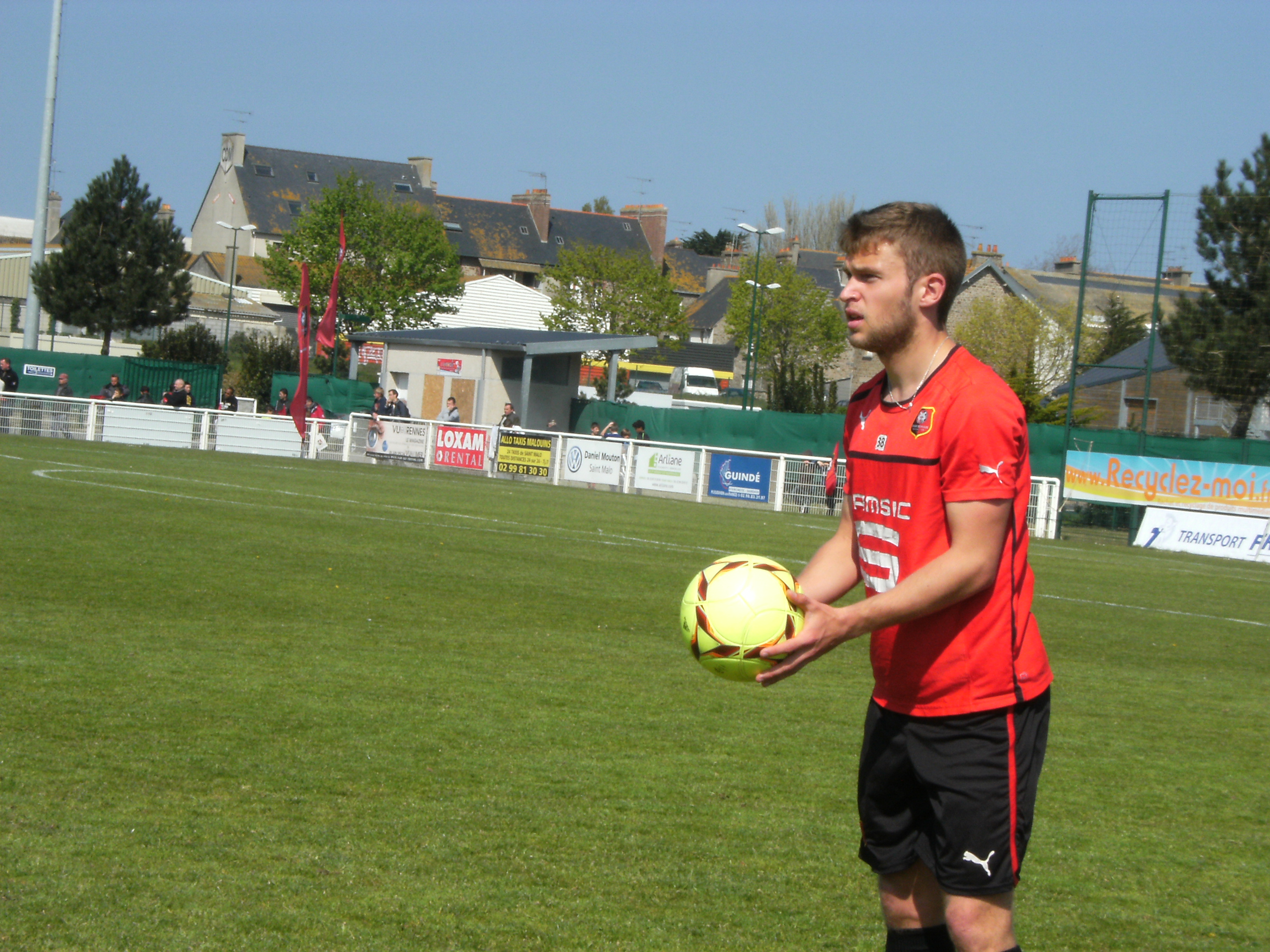 Photo prise lors d'un entraînement du Stade rennais au stade de Marville de Saint-Malo le 3 mai 2013. Ici, Kévin Beauverger.